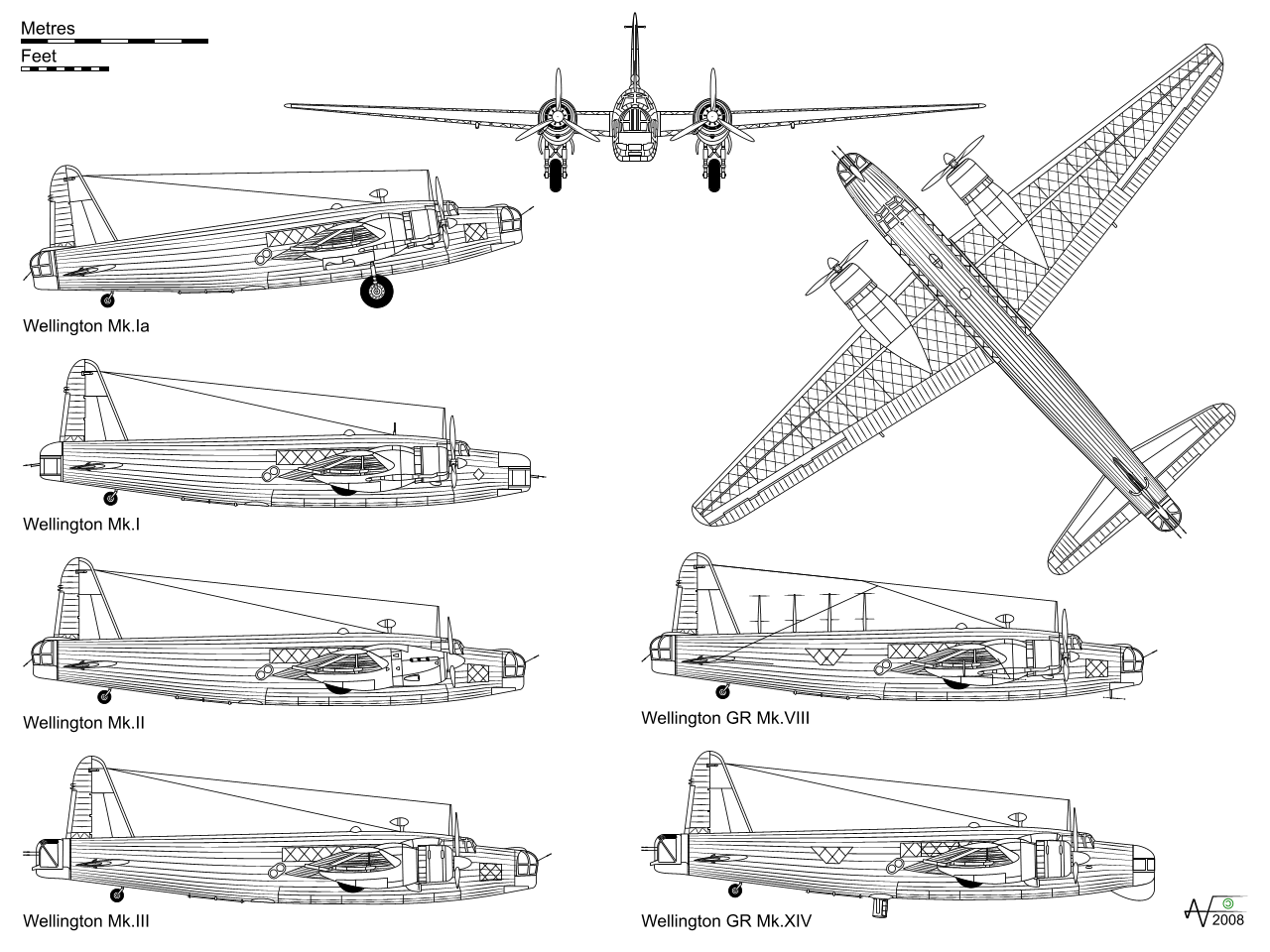 Vickers Wellington